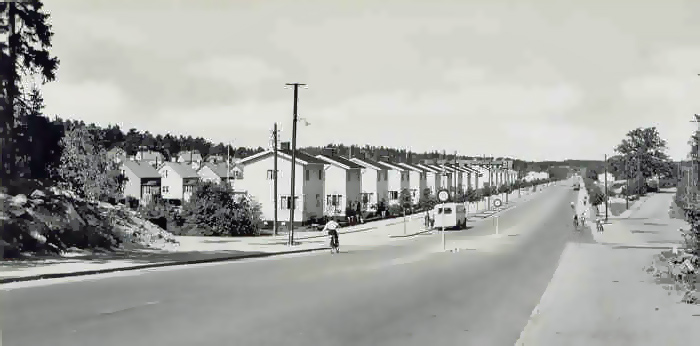 Drottningholmsvagen vid Nockebyhov